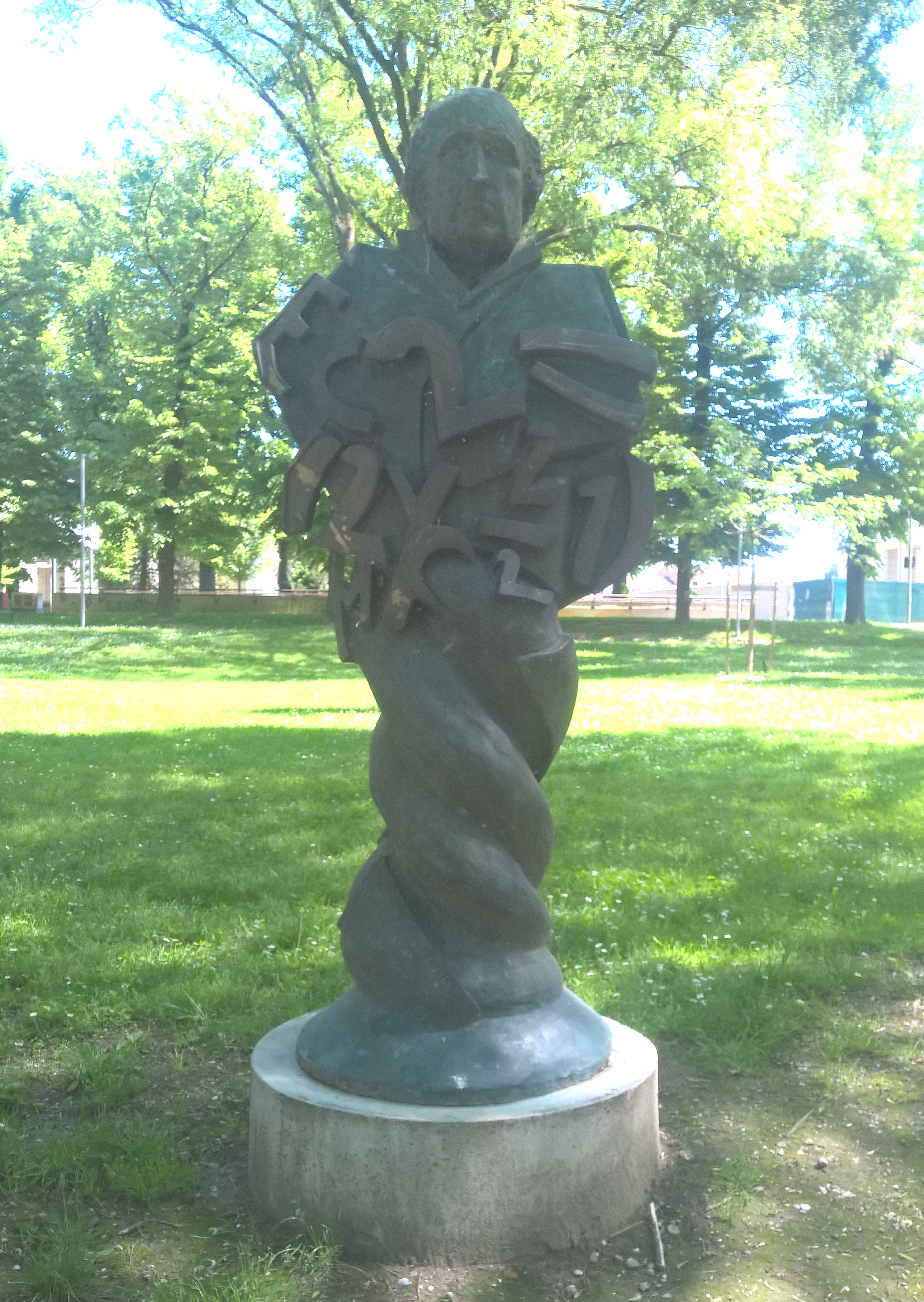 Bronzo del monumento nei giardini Nuvolari, a Mantova'. Lo scultore Ugo Nespolo oltre al ritratto di Carlo Castagnoli ha inserito nell'opera una serie di numeri, la famosa Castagnoli-formula, elaborata dal fisico mantovano negli Anni 50 del novecento, molto citata dai ricercatori.